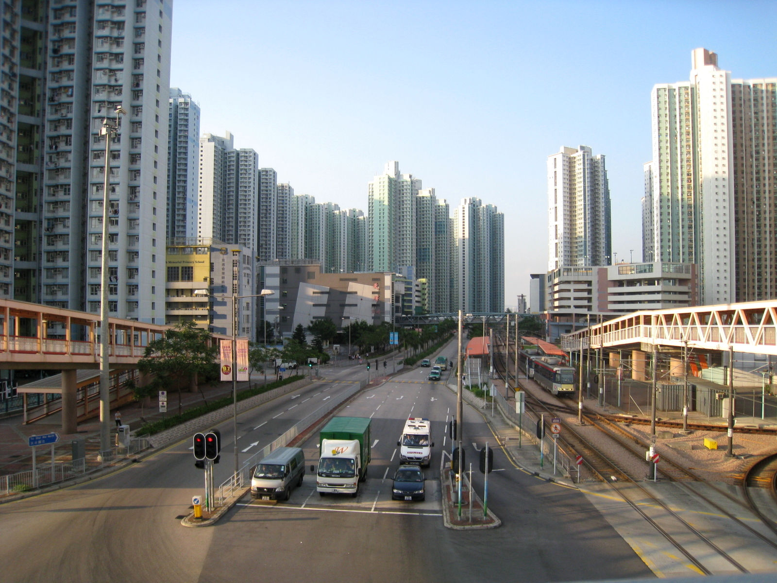 HK Tin Shui Wai North 2008 天水圍北